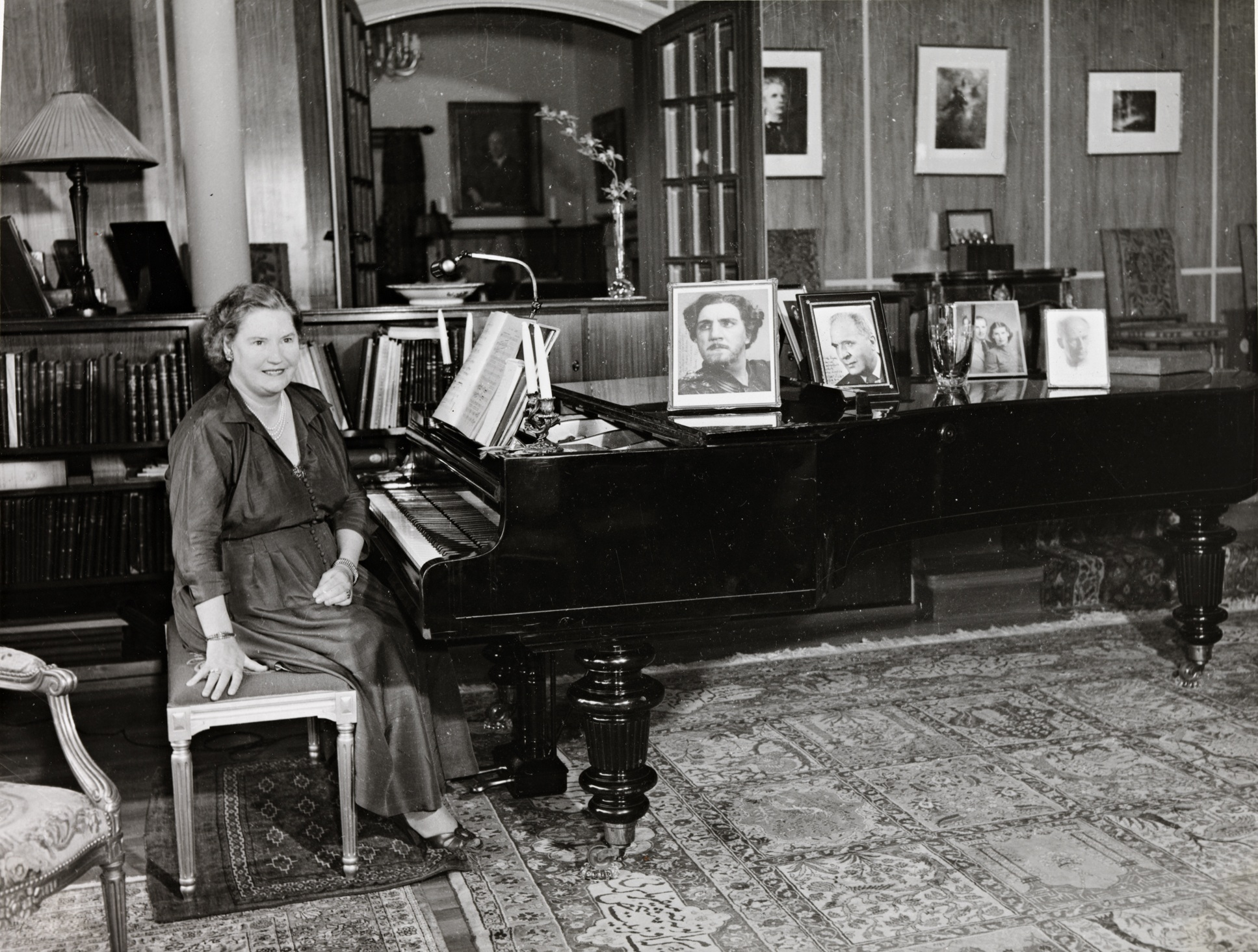 Tittel / Title: Portrett av Kirsten Flagstad (1895-1962) ved flygelet Dato / Date: ukjent / unknown Fotograf / Photographer: ukjent / unknown Eier / Owner Institution: Nasjonalbiblioteket / National Library of Norway Lenke / Link: Bildesignatur / Image Number: blds_05749